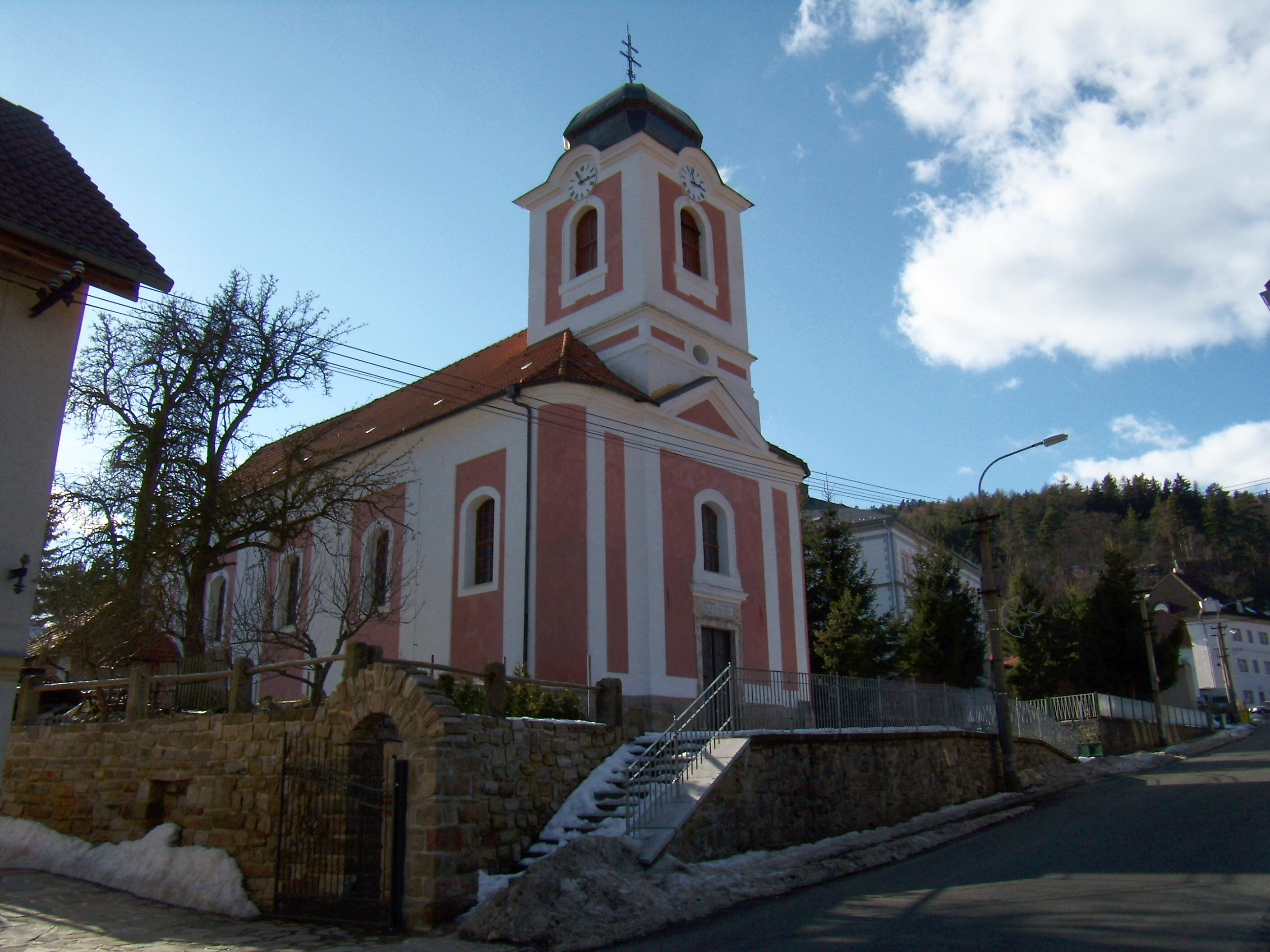 Perštejn - kostel sv. Vendelína